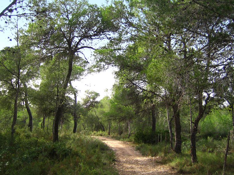 Bosc de pi mediterrani de la Vallesa (l'Eliana, Camp de Túria, País Valencià).